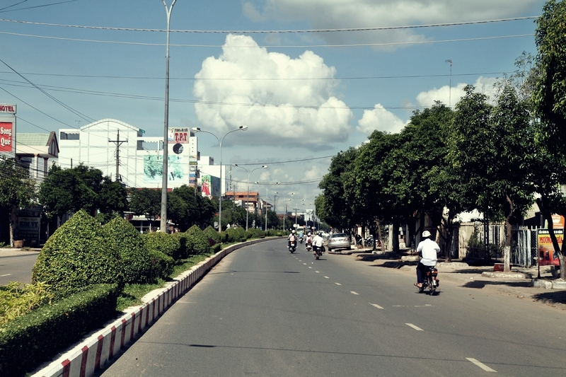 Phường 3 thuộc Thị xã Tây Ninh